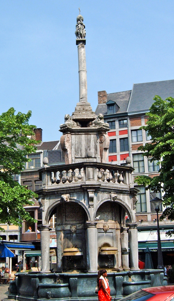 Perron: Brunnen der Drei Grazien auf dem Marktplatz in Lüttich. Der Perron war das Symbol der Gerichtsbarkeit des Fürstbischofs, hier wurden Urteile öffentlich verkündet und ausgeführt.